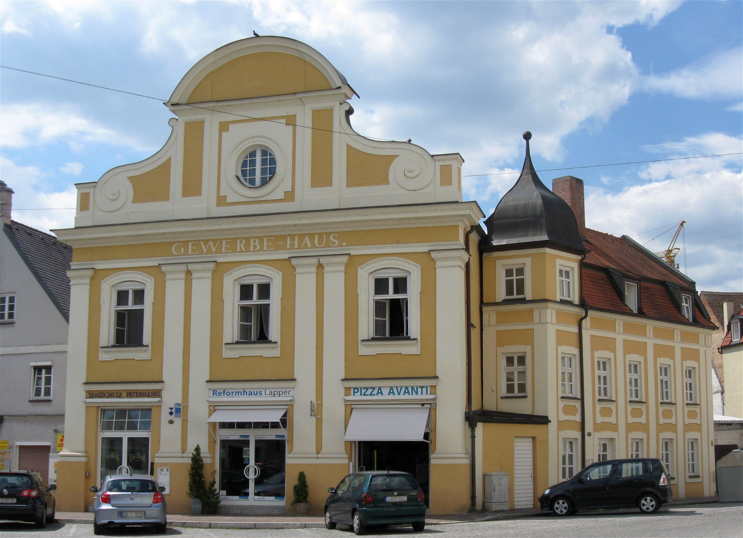 Regierungsplatz 542; Ehem. Evang.-Luth. Pfarrkirche, seit 1898 Gewerbehaus, zweigeschossige Anlage mit Volutengiebel und Segmentbogenaufsatz, 1848. D-2-61-000-451